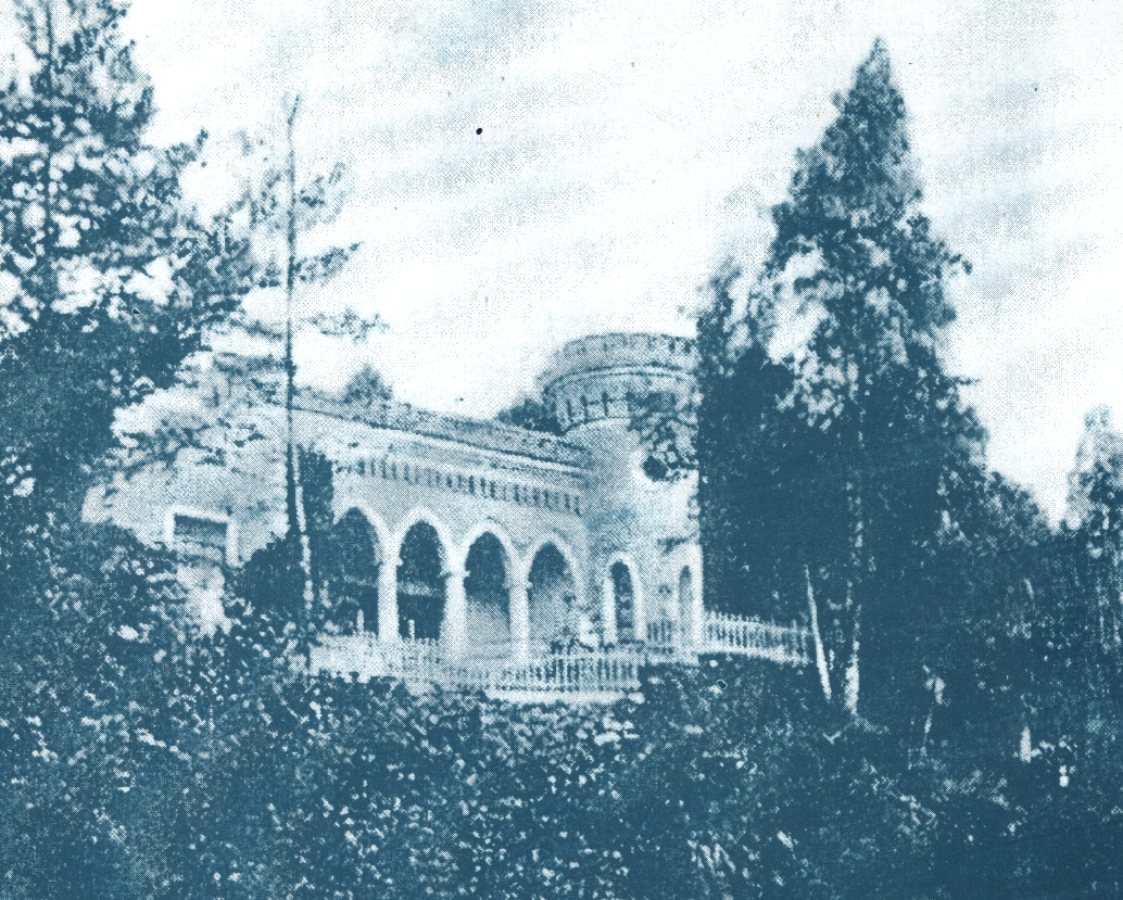 Ciucea castle, Cluj County, Romania